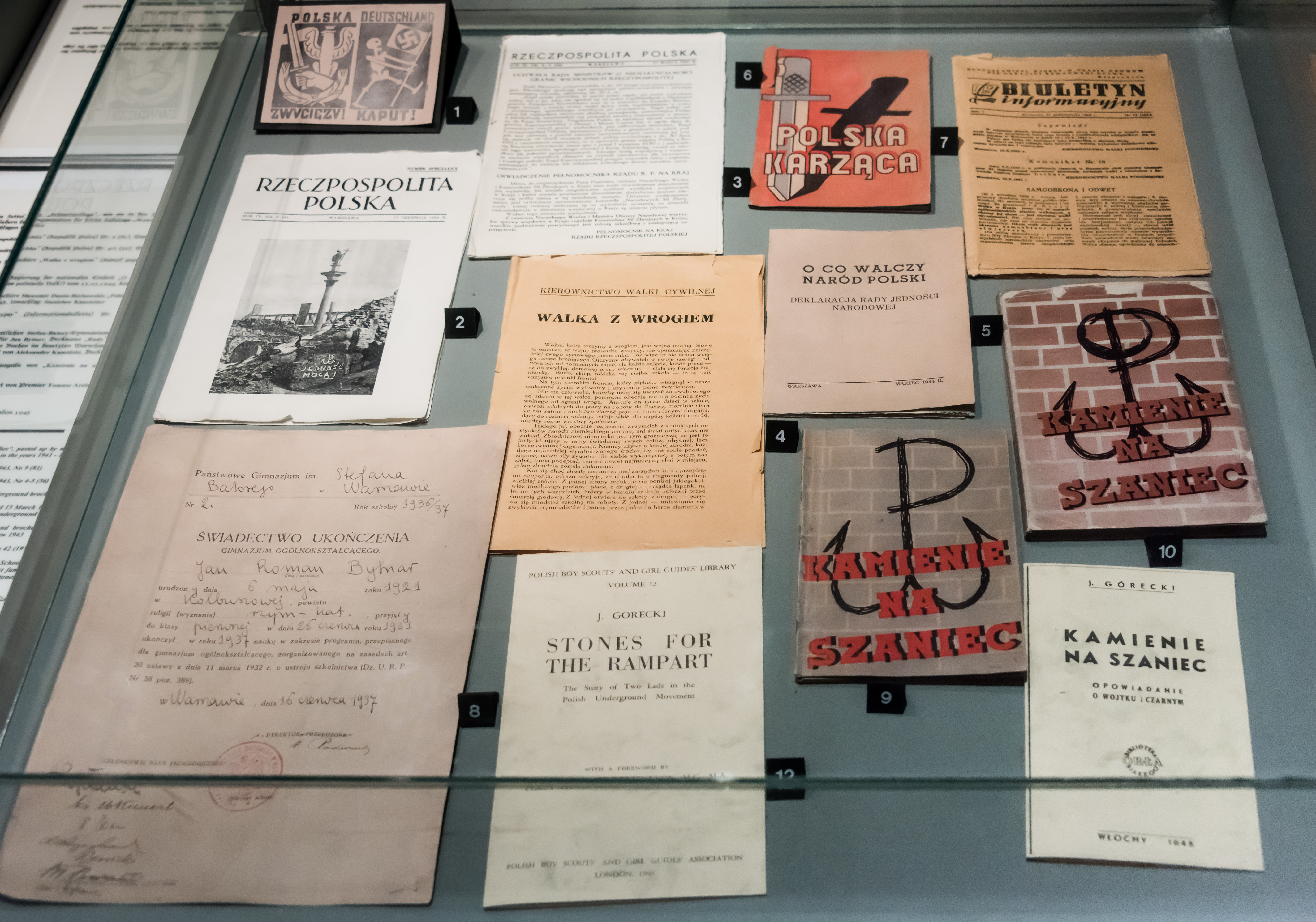 Fragment ekspozycji w Muzeum Więzienia Pawiak, widoczne m.in. świadectwo ukończenia Państwowego Gimnazjum im. Stefana Batorego w Warszawie przez Jana Bytnara i pierwsze wydanie Kamieni na szaniec